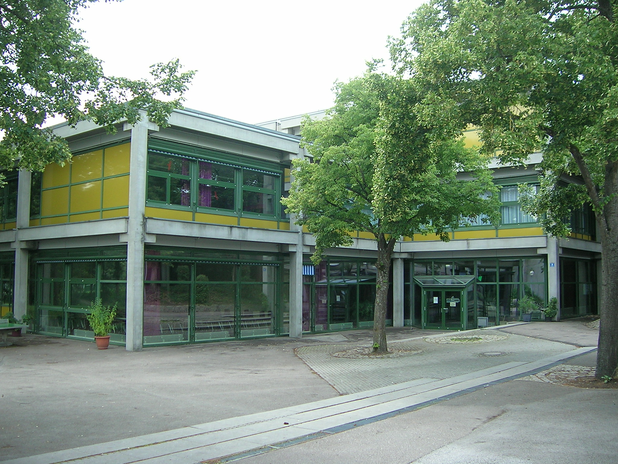 Schottenau 18 Eichstätt: Mittelschule im Schulzentrum Eichstätt-Schottenau.